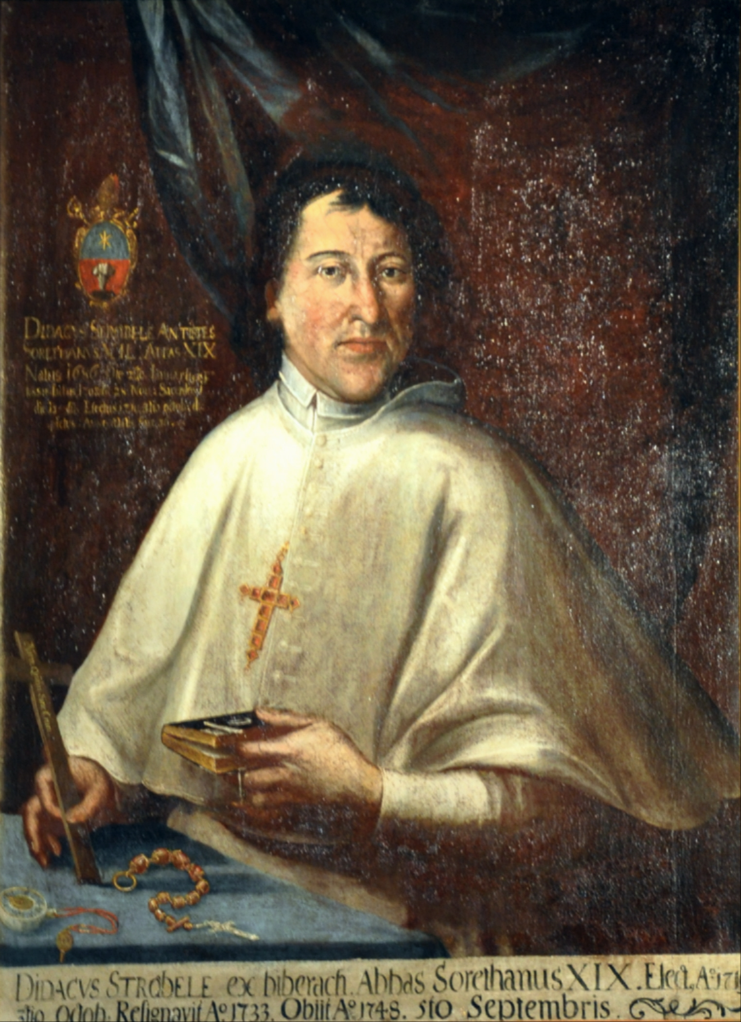 Portraits der Äbte von Schussenried, ausgestellt im Neuen Kloster Schussenried; Abt Didacus Ströbele, Gemälde vor 1733